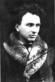 Ercole Luigi Morselli